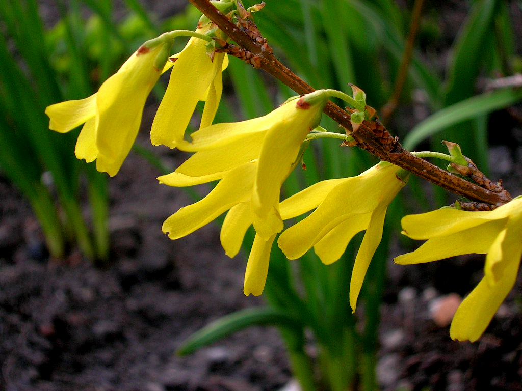 Zdjęcie forsycji